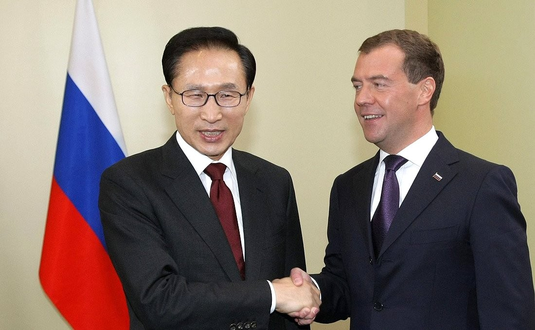 ЯРОСЛАВСКАЯ ОБЛАСТЬ, Ярославль. Дмитрий Медведев с Президентом Республики Кореи Ли Мён Баком.